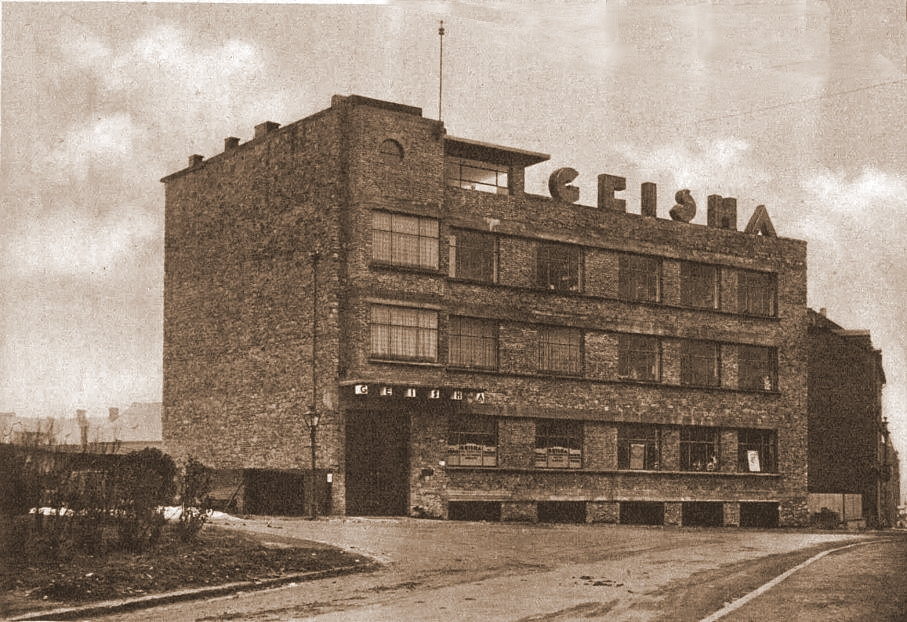 D'fréier Fabrécksgebäi vun der Entreprise Geisha, op Nummer 38, rue du Laboratoire an der Stad Lëtzebuerg.